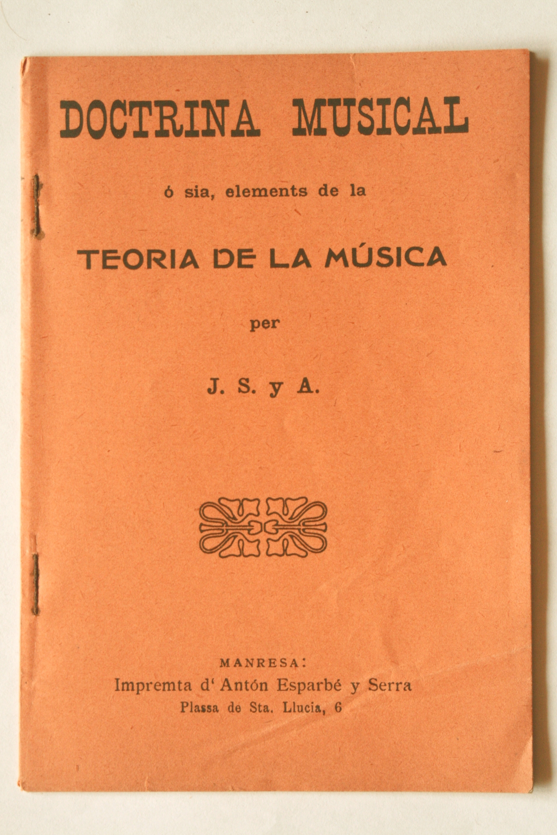 Portada del tractat de teoria musical de Joaquim Sarret i Arbós